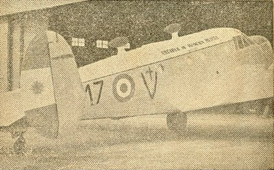 Avión del director de la Escuela de Aviación